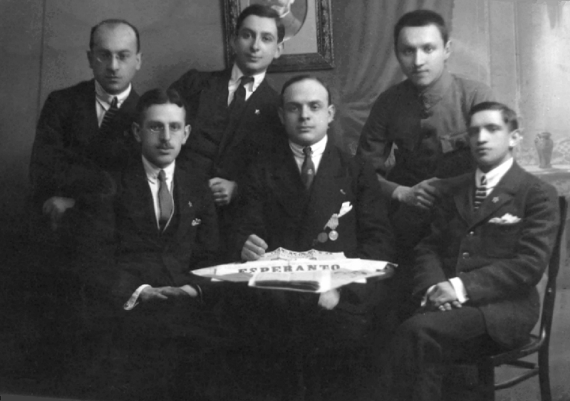 Zamenhofa Esperanto-Societo, Bialystok um 1920. Gruppenfoto der Vorstandsmitglieder des Vereins mit ihrem Gast Leon Agourtine aus Frankreich. Rückseitig genannt: J. Sapiro, F. Kurjanski, S. Liberman, S. Kaplan, R. Platzek